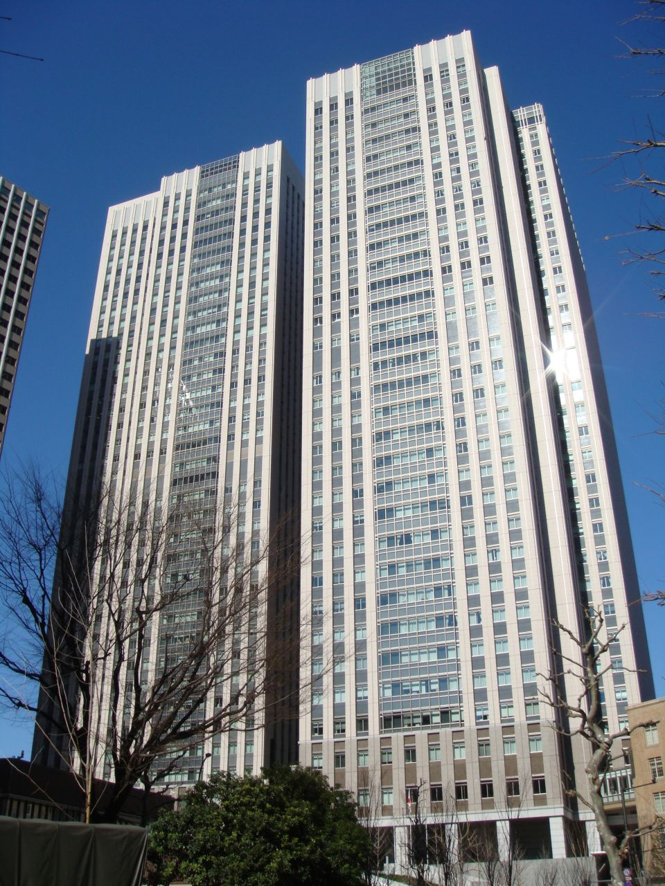 Kasumigaseki Common Gate, Kasumigaseki, Chiyoda-ku, Tokyo, Japan / 霞が関コモンゲート（東京都千代田区霞が関）